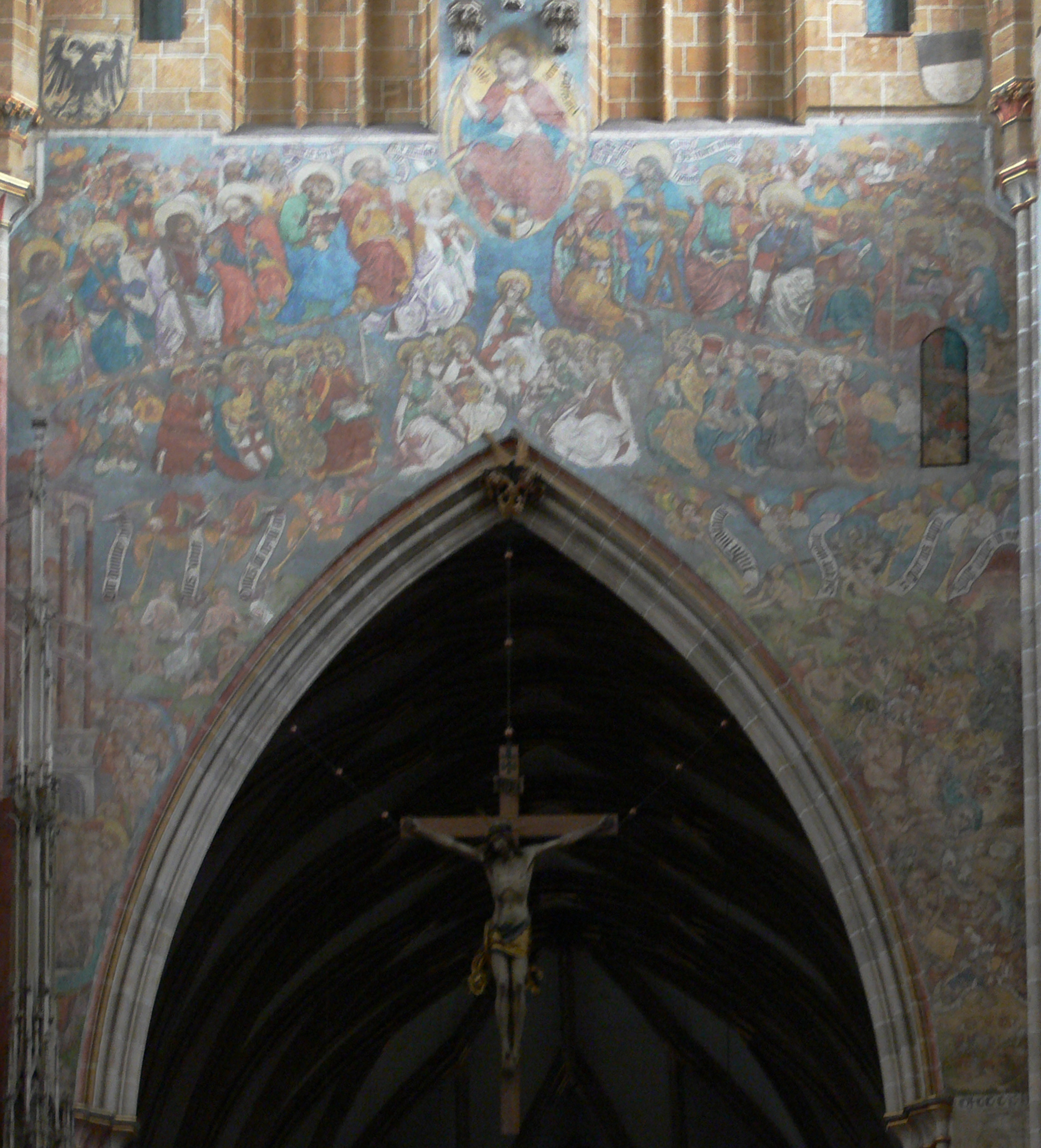 Ulmer Münster, Wandbild "Weltgericht", Fresko, Hans Schüchlin zugeschrieben, 1471